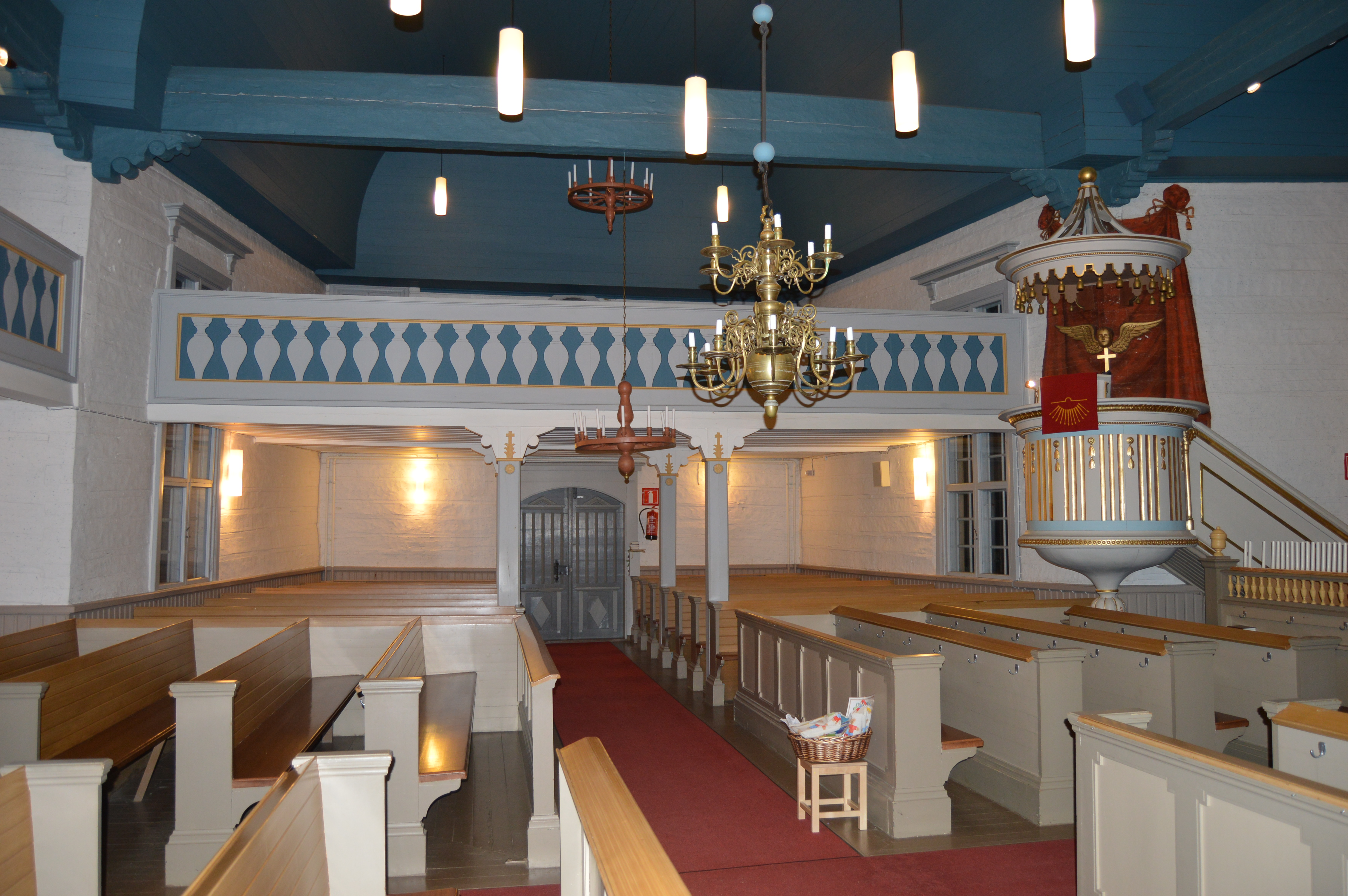 Joensuun Kiihtelysvaaran kirkko sisältä